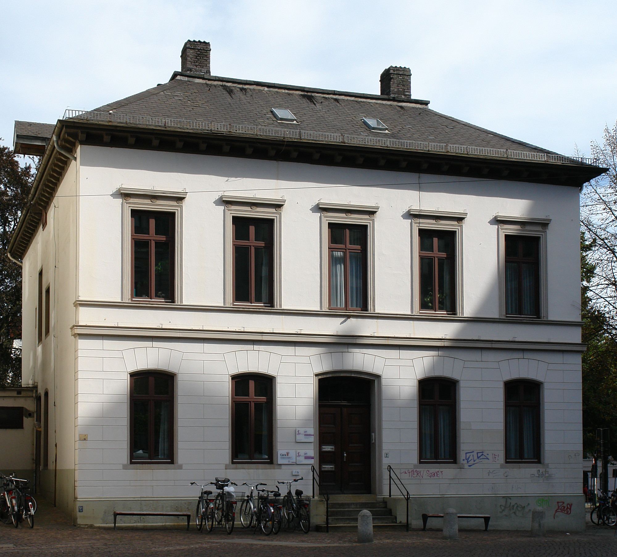 Pfarrhaus der St. Petri-Domgemeinde in Bremen, Domsheide 2.Das abgebildete Objekt ist ein geschütztes Kulturdenkmal in der Freien Hansestadt Bremen, mit der Nr. 0475 beim Landesamt für Denkmalpflege registriert.